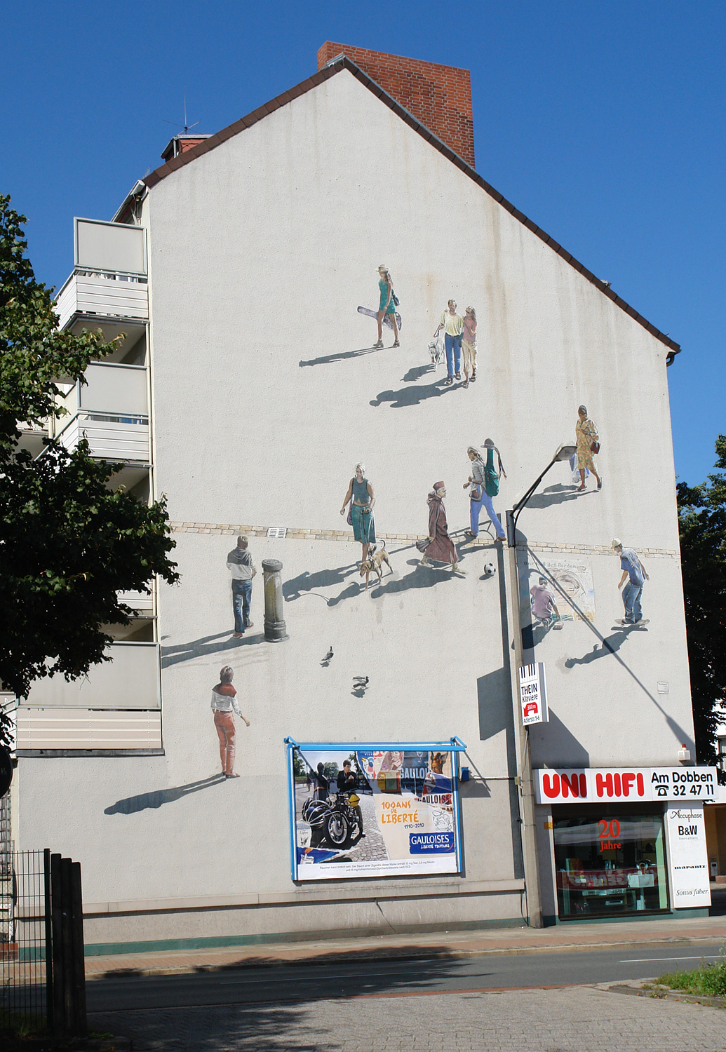 Wandbild in Bremen: Am Dobben 23. Titel: En passant von Jub Mönster 18m x 13m, 2001 (2004 überholt) k: kunst im öffentlichen raum bremen